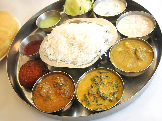 Bombay Thali - Tamil Nadu Bhavan